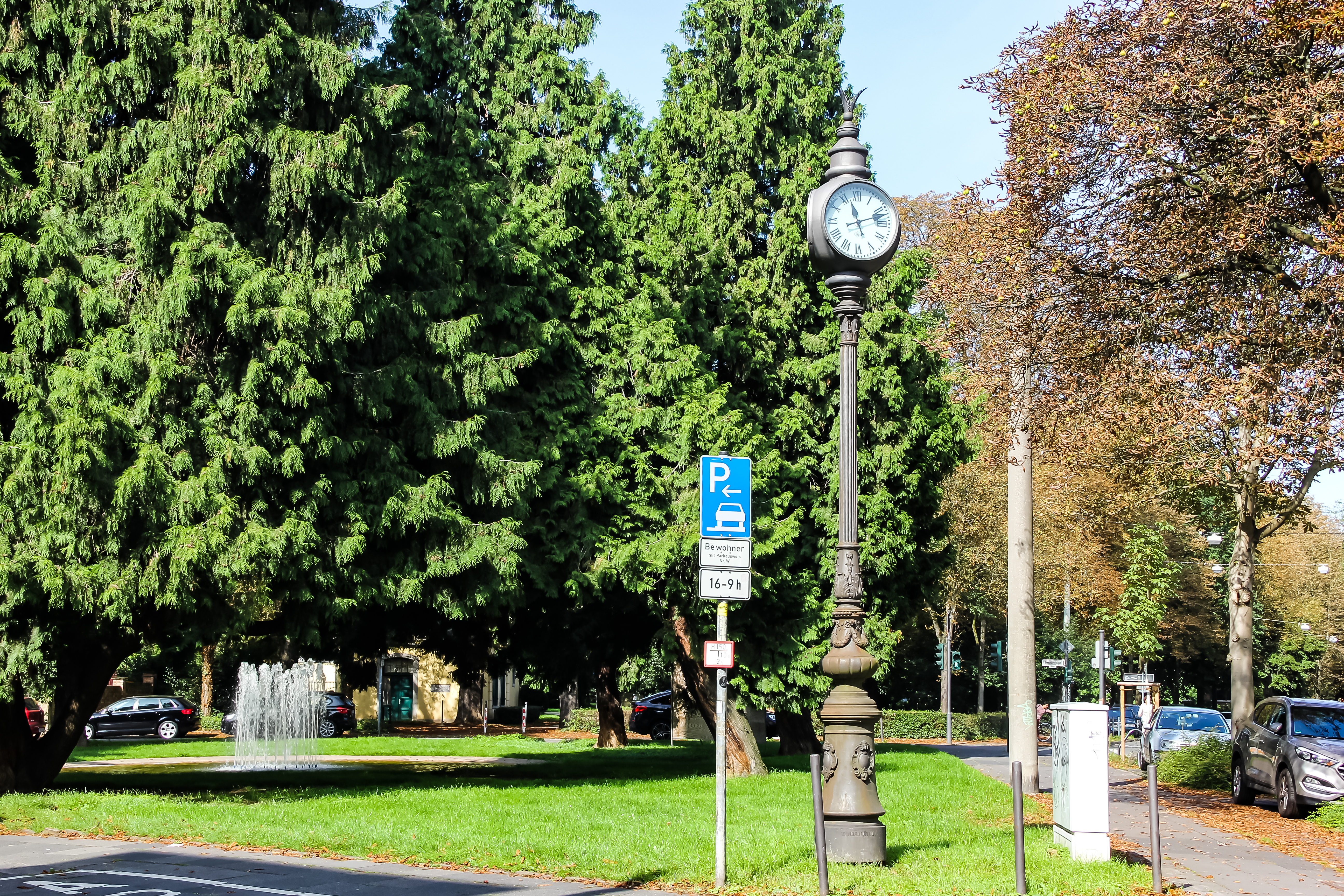 Straßenuhr am Bonner Beethovenplatz in der Weststadt.